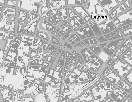 overblijfselen van de eerste stadsmuur van Leuven aangeduid op de kaart van onroerend erfgoed